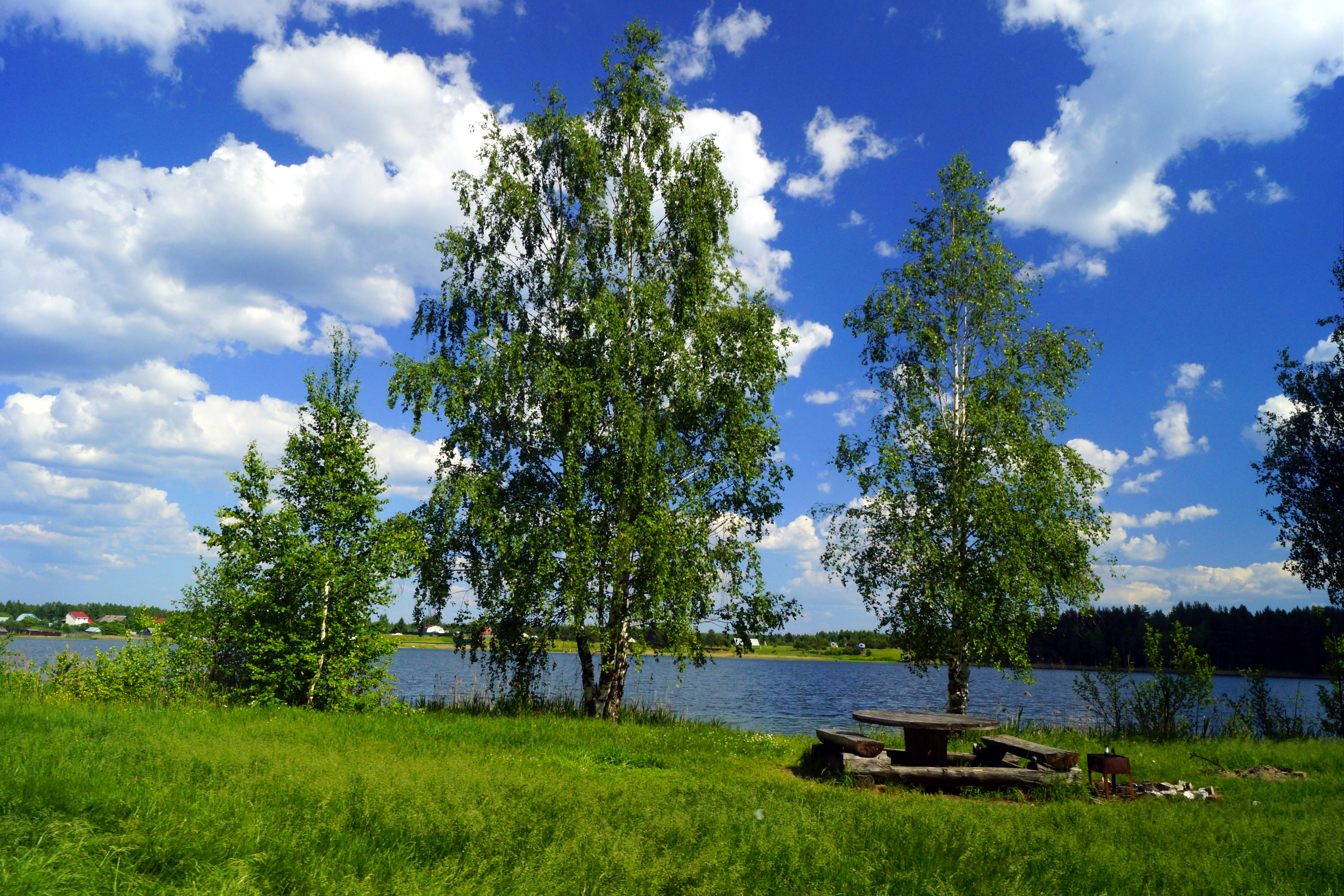 Белое озеро, Клепиковский район This image is related to the protected area of Russia number 6210053